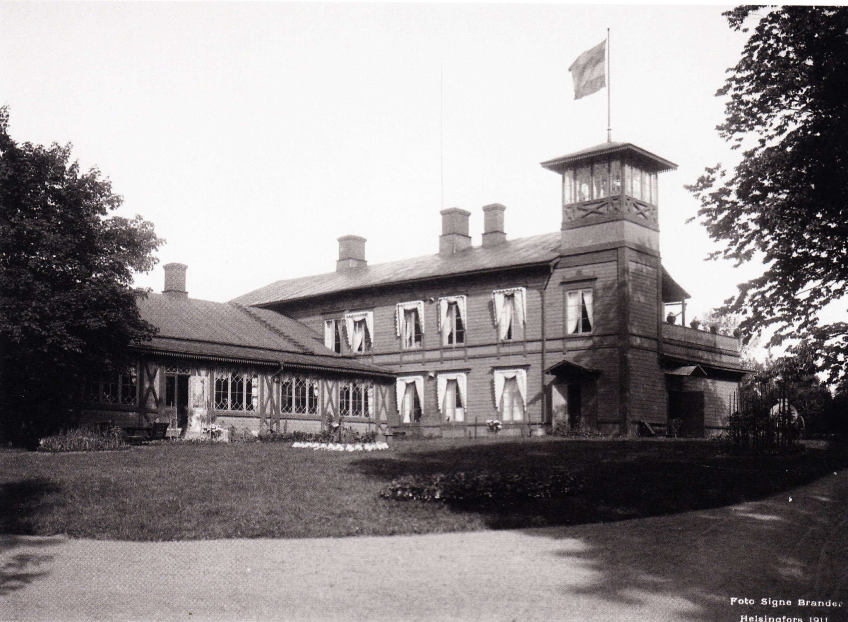 Kuitian kartanon päärakennus